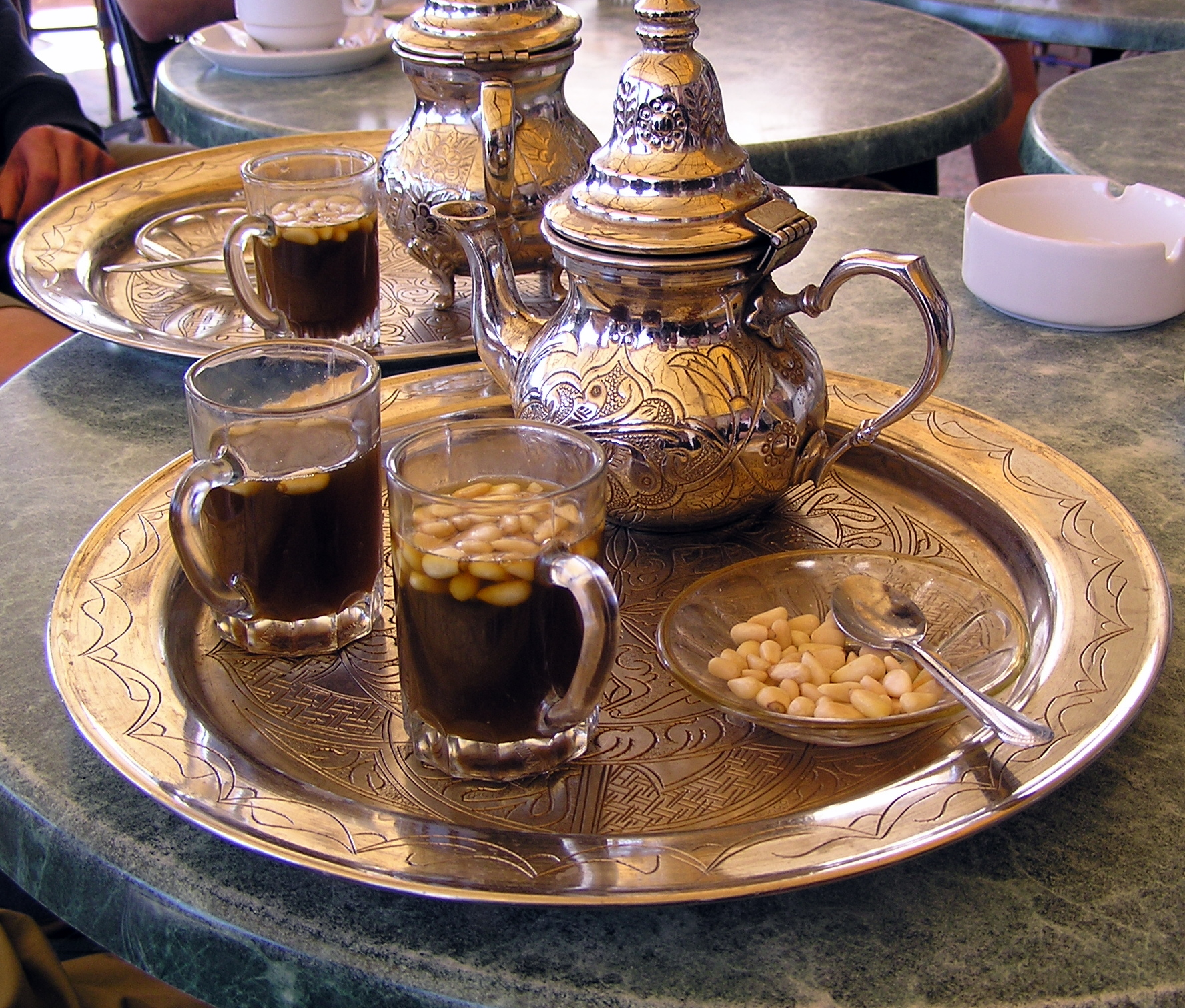 Plateau de thé aux pignons tunisien